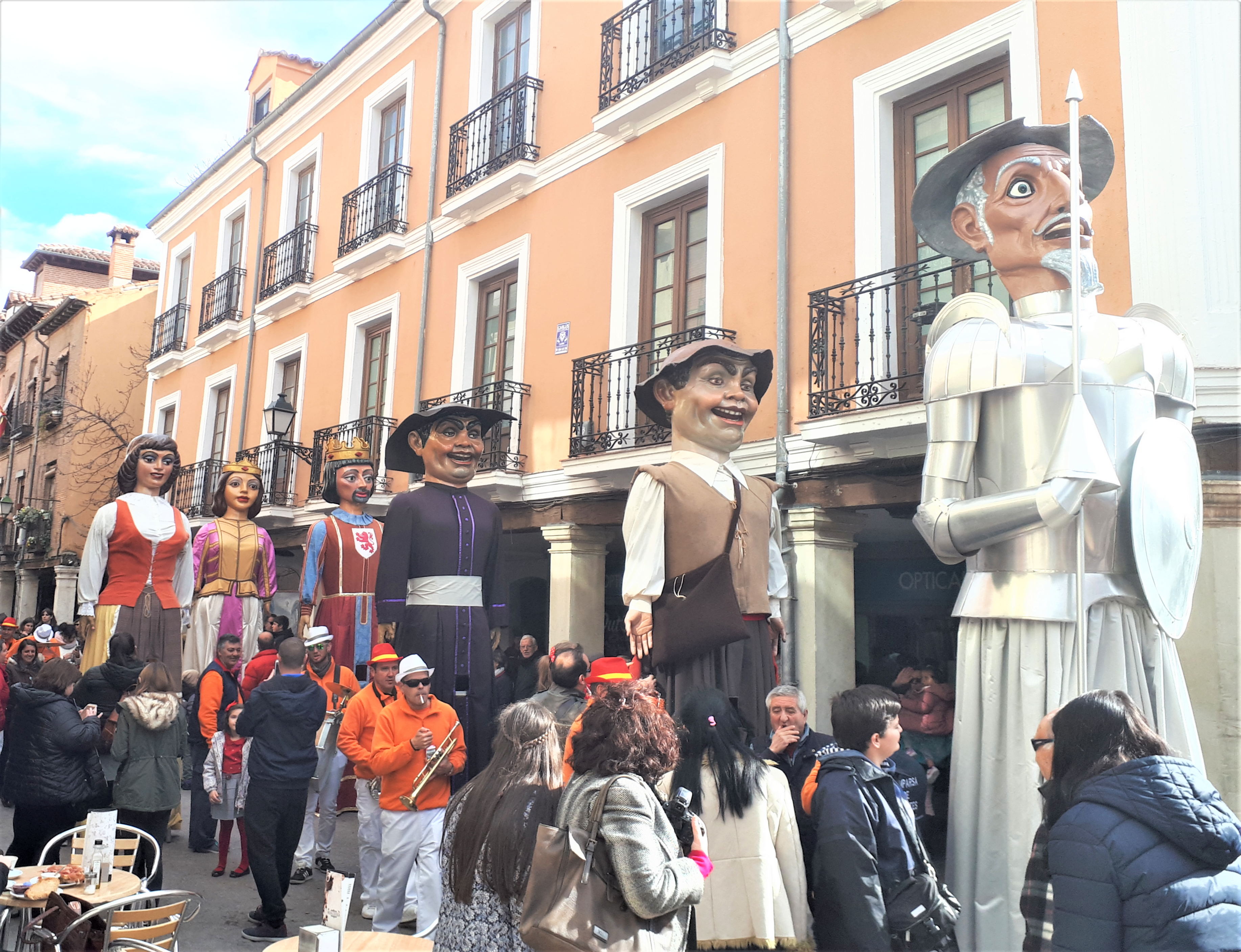 Comparsa de Gigantes y cabezudos de Alcalá de Henares (Comunidad de Madrid - España), desfilando por la calle Mayor. Con las figuras de Don Quijote, Sancho Panza, El Bachiller, El Duque, La Duquesa y Dulcinea.